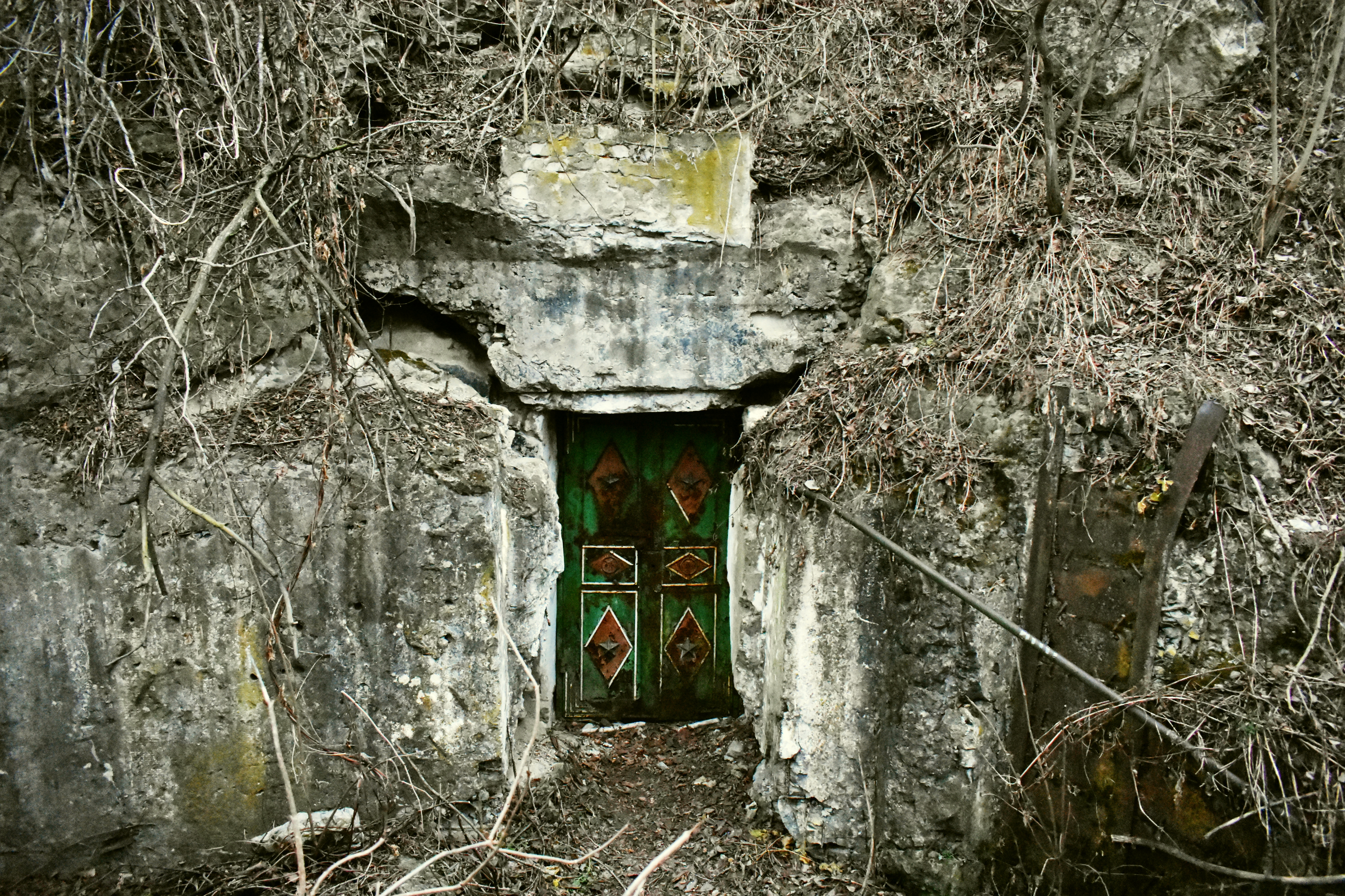 ДОТ 112 Лінія Сталіна, околиці м. Могилів-Подільський Вінницька область